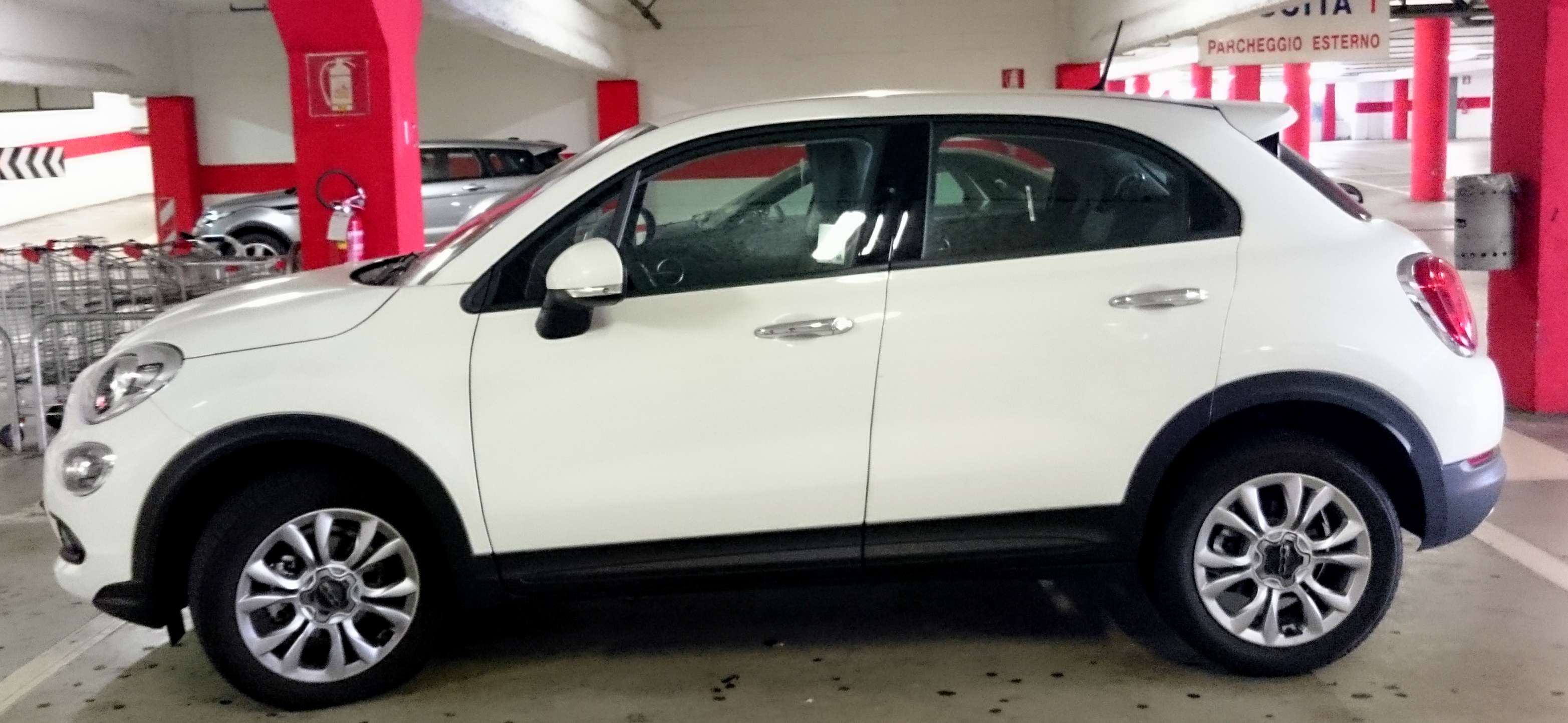 Una Fiat 500X a Milano